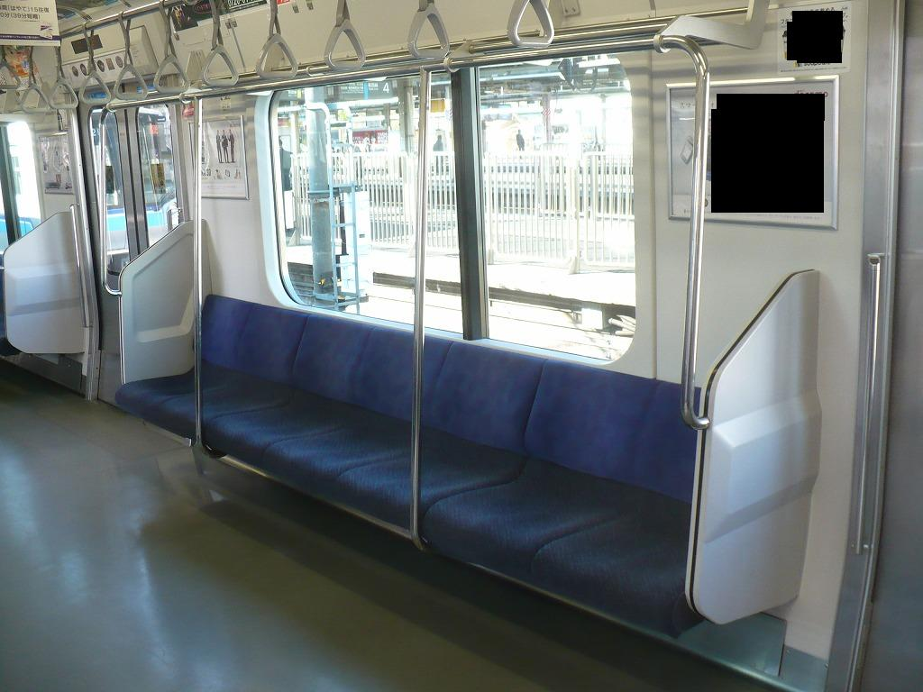 E231形内装